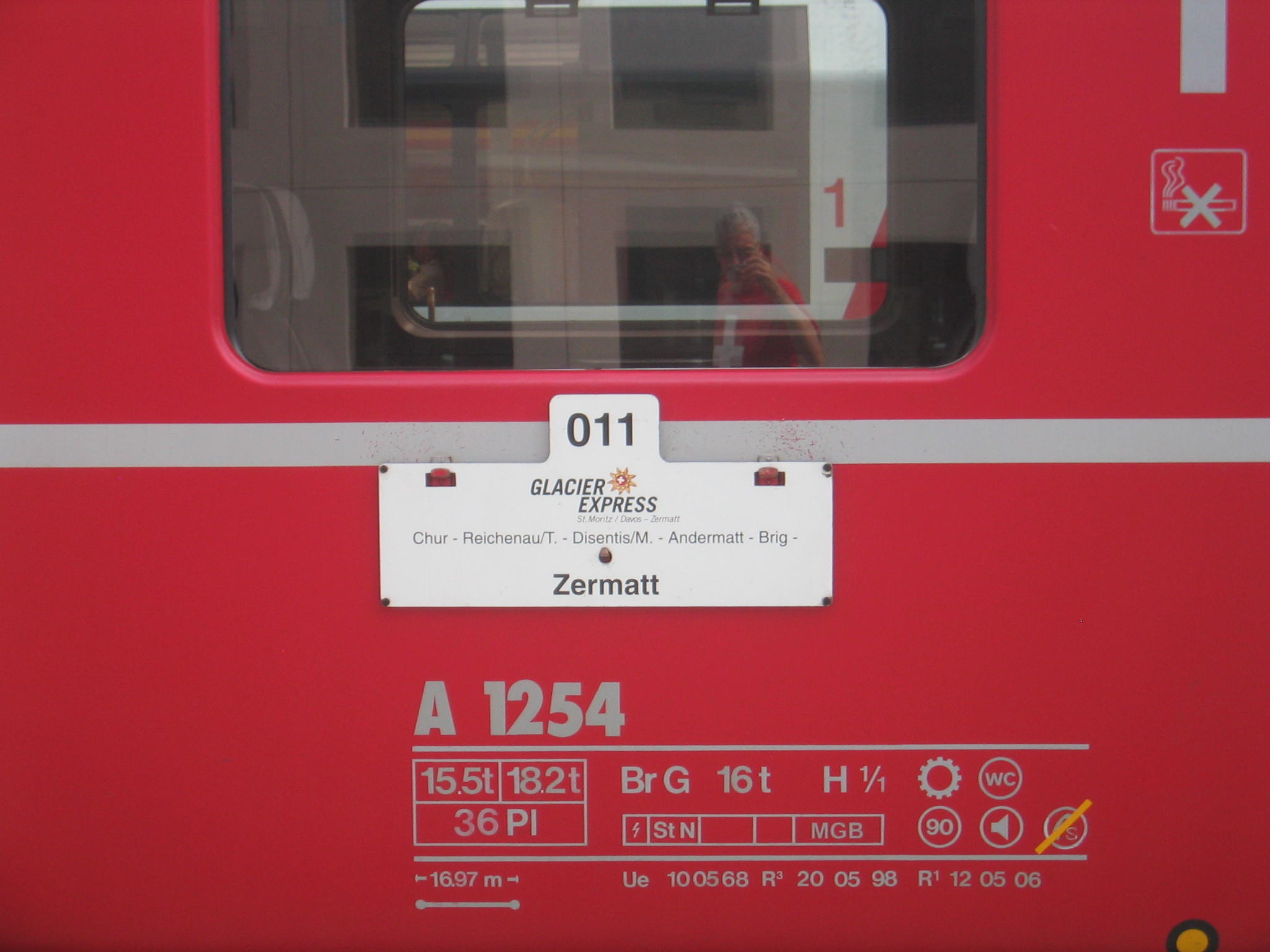 RhB Zugsbeschilderung